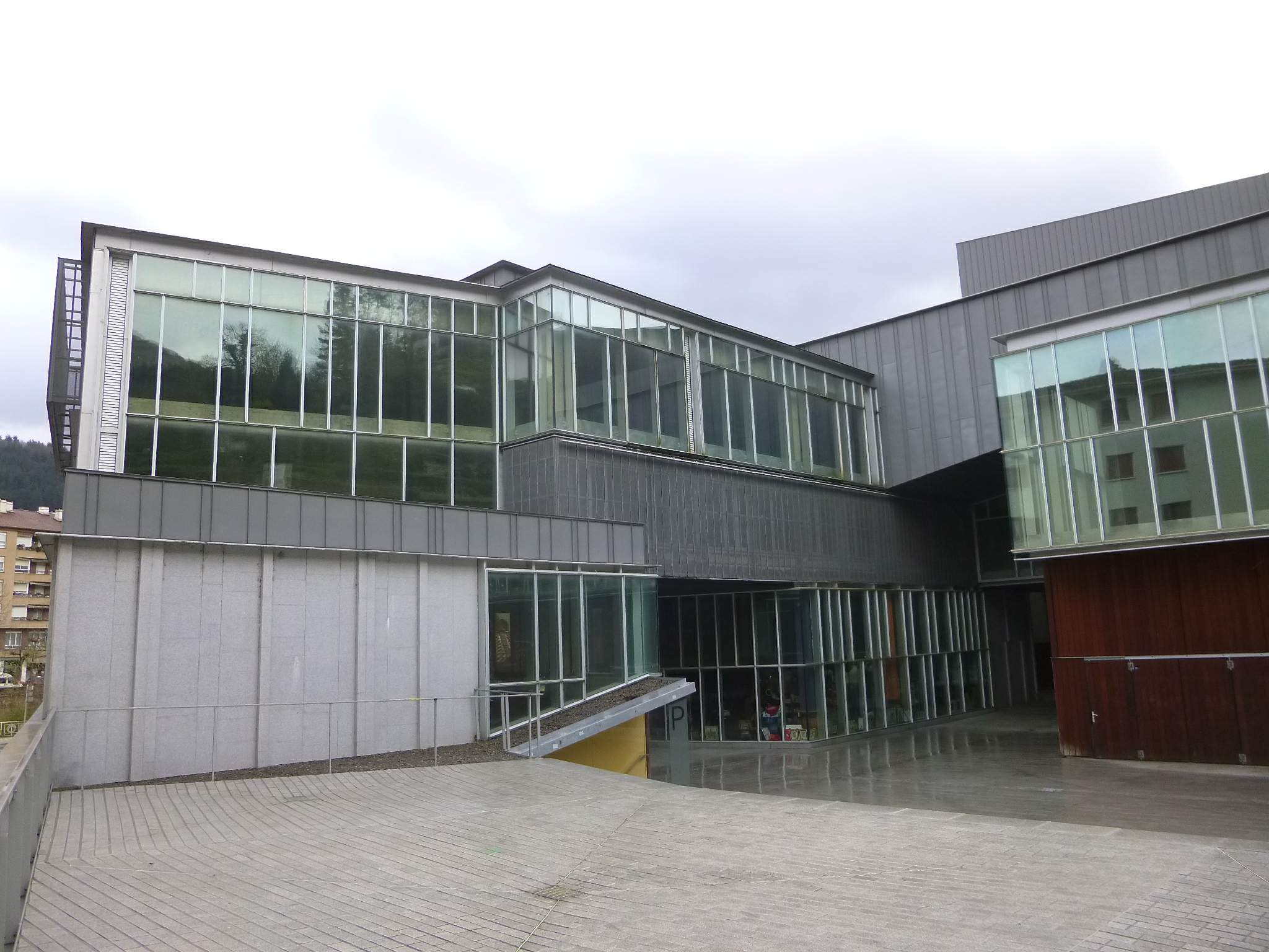 Soreasu Antzokia (Azpeitia)